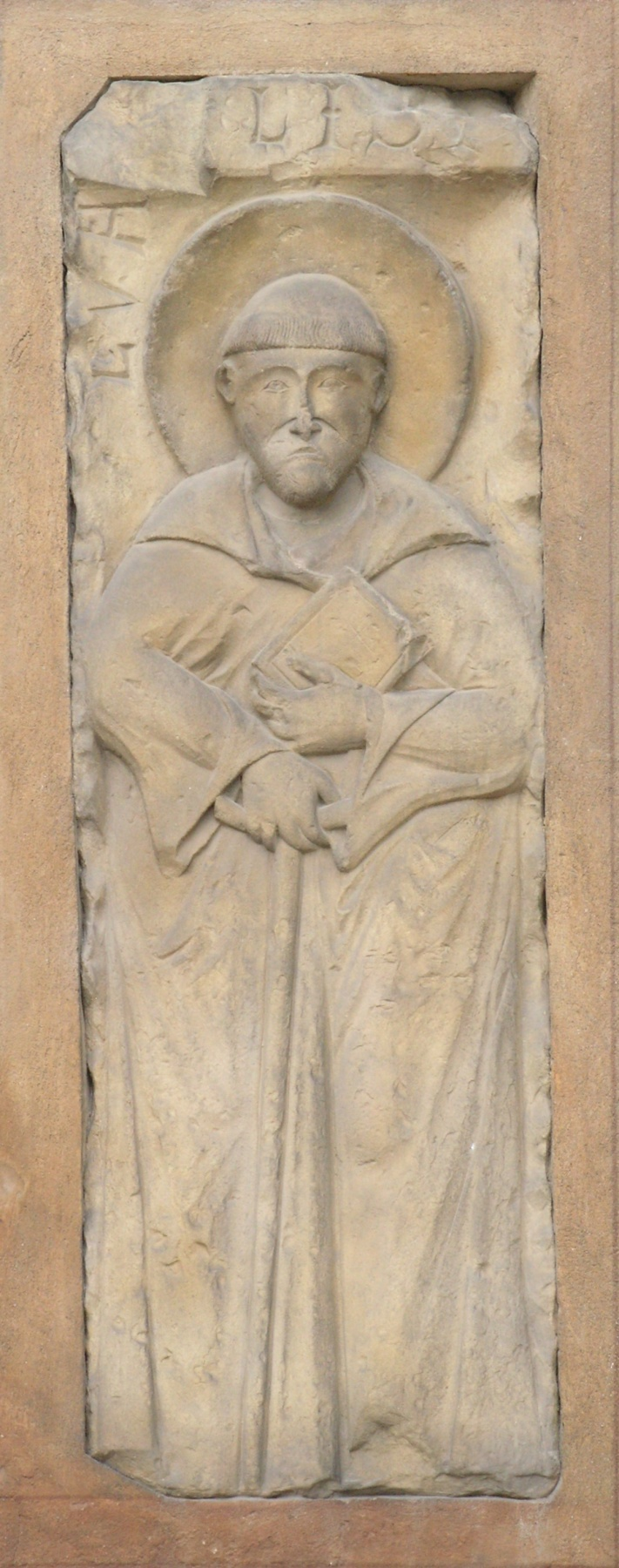 Náhrobní kámen svatého Vintíře na jižní stěně baziliky sv. Markéty